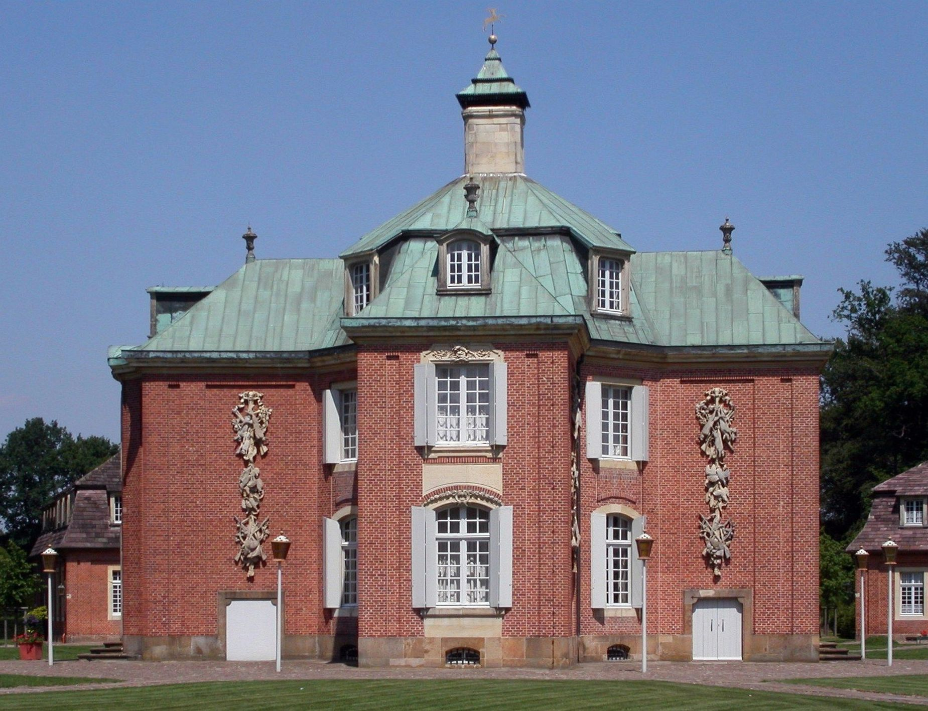 Zentralgebäude des Schloss Clemenswerth im Emsland